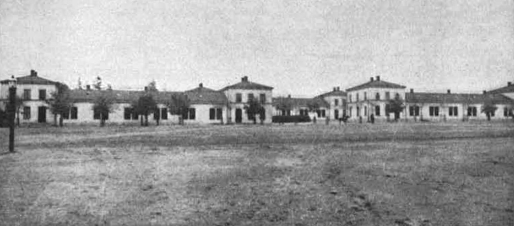 Kaserner för Livregementets dragoners på Ladugårdsgärdet vid Djurgårdsbrunnsviken. Under åren 1930-1976 var de Etnografiska museets lokaler.